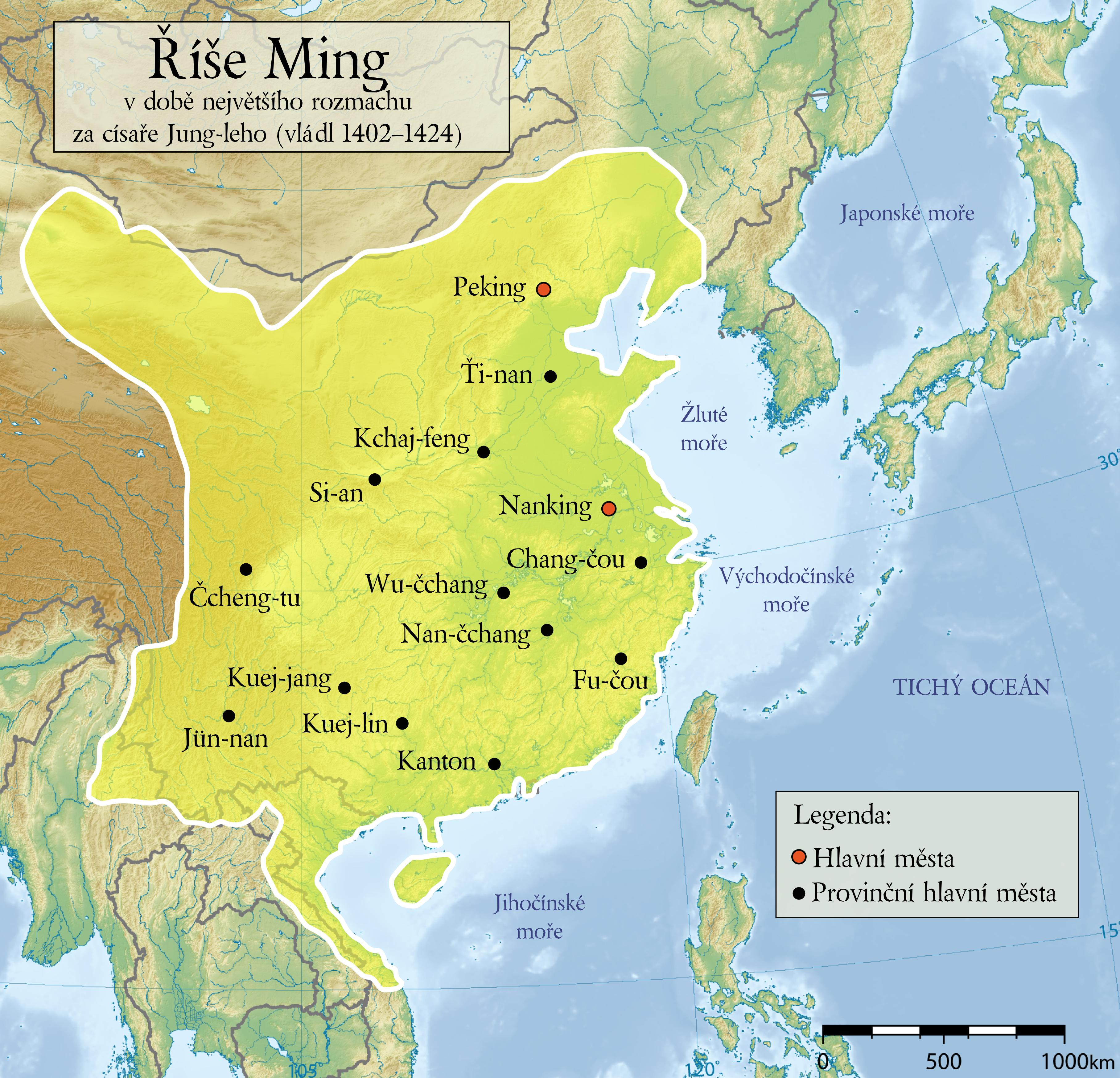 Mingská Čína v době svého největšího rozmachu za císaře Jung-leho